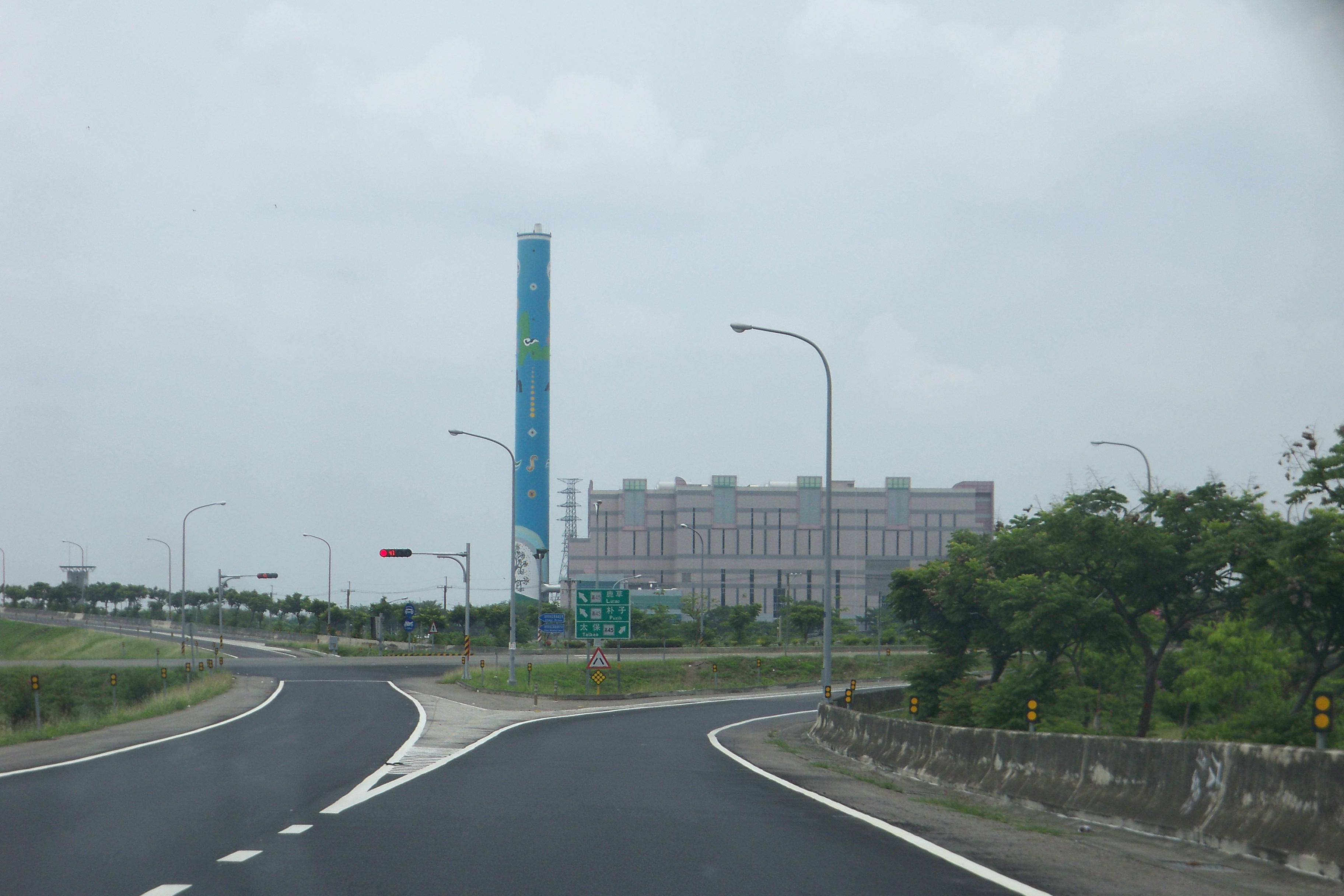 嘉義縣鹿草鄉 垃圾焚化廠